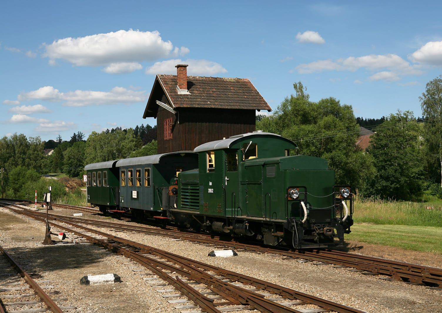 Die in das Aussehen der 1960er-Jahre zurückversetzte 2091.02 fährt mit einem Sonderzug des WSV von Heidenreichstein kommend in den Bf. Alt-Nagelberg ein.